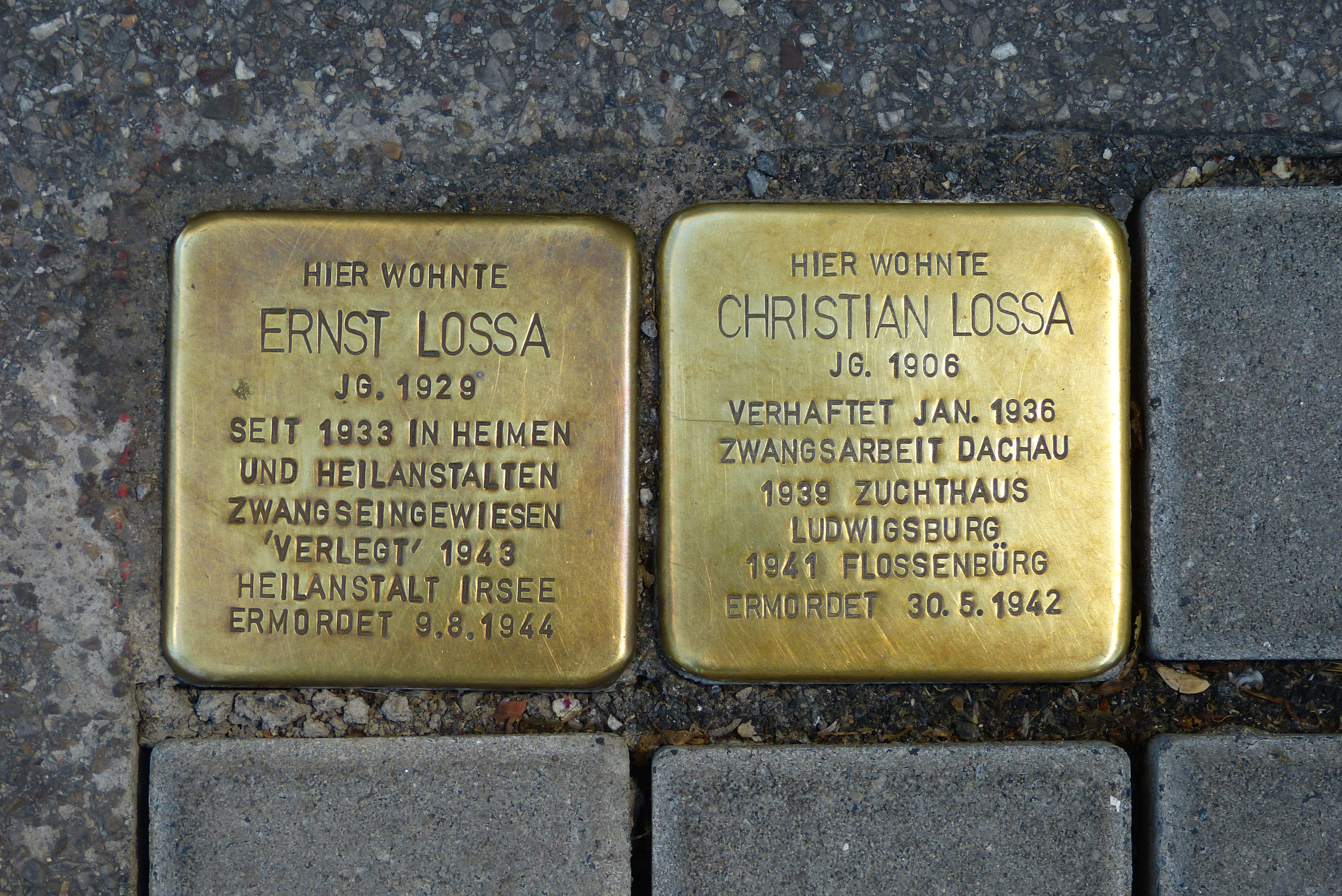 Stolpersteine für Ernst Lossa und Christian Lossa in Augsburg, Wertachstraße 1 - Hier wohnte Ernst Lossa, Jg. 1929, seit 1933 in Heimen und Heilanstalten zwangseingewiesen, 'verlegt' 1943 Heilanstalt Irsee, ermordet 9.8.1944 - Hier wohnte Christian Lossa, Jg. 1906, verhaftet Jan. 1936, Zwangsarbeit Dachau, 1939 Zuchthaus Ludwigsburg, 1941 Flossenbürg, ermordet 30.5.1942